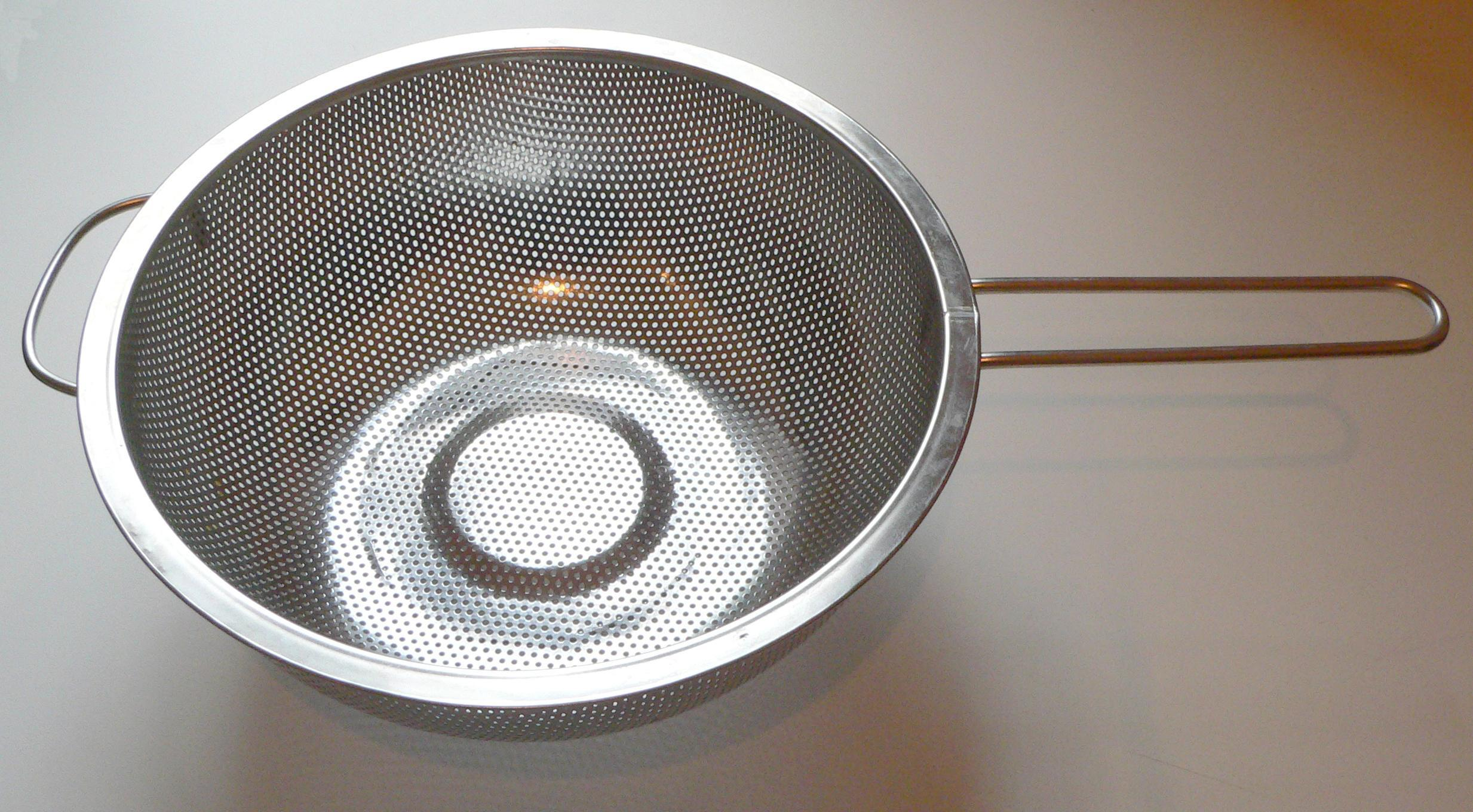 Durchschlag bzw. Abtropfsieb / colander / passoire